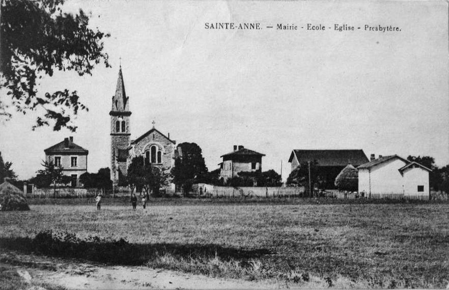 Sainte-Anne-d'Estrablin (Sainte-Anne-sur-Gervonde), Isère, France. La mairie, l'école, l'église, le presbytère.